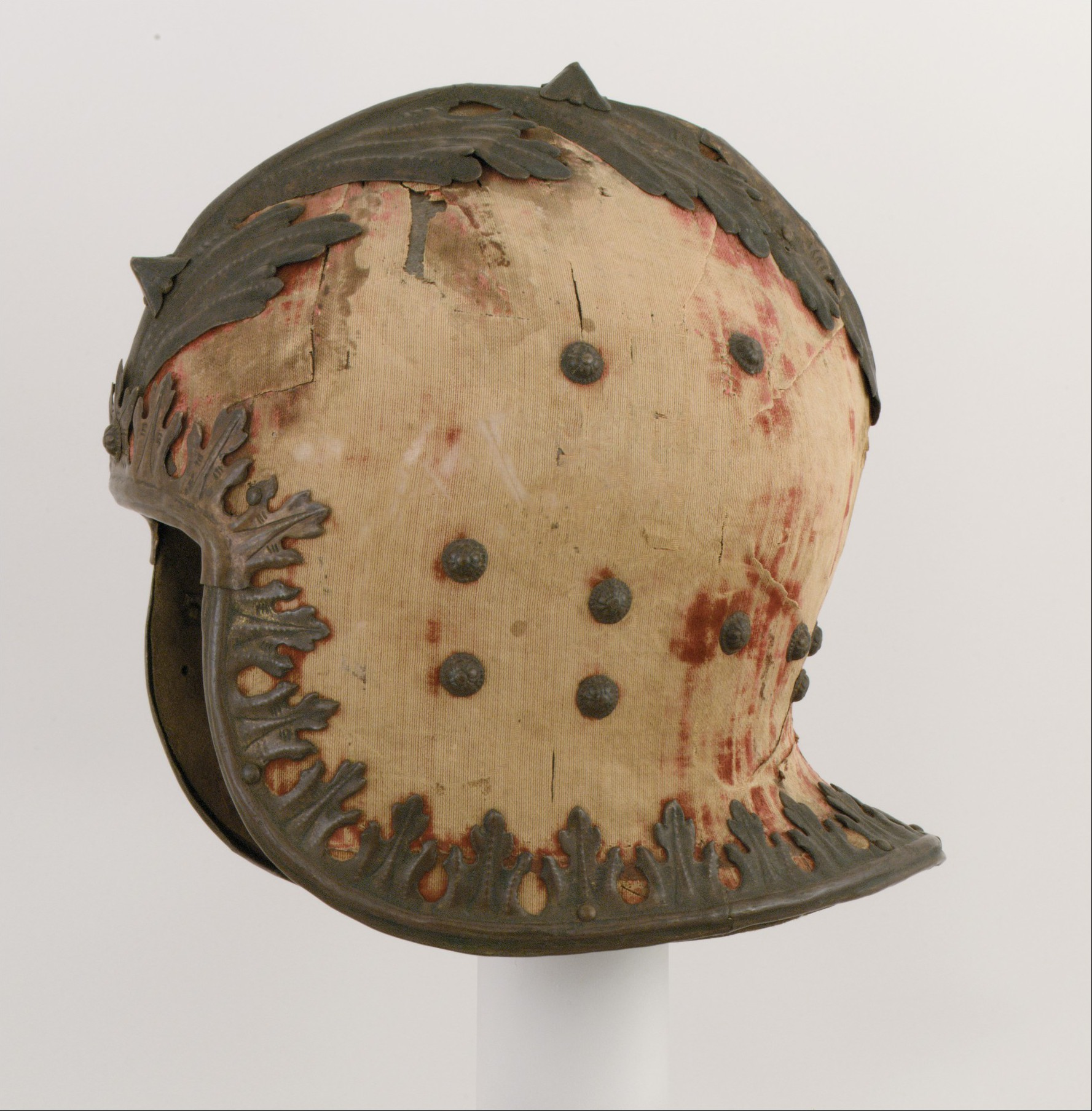 Italian; Sallet; Helmets